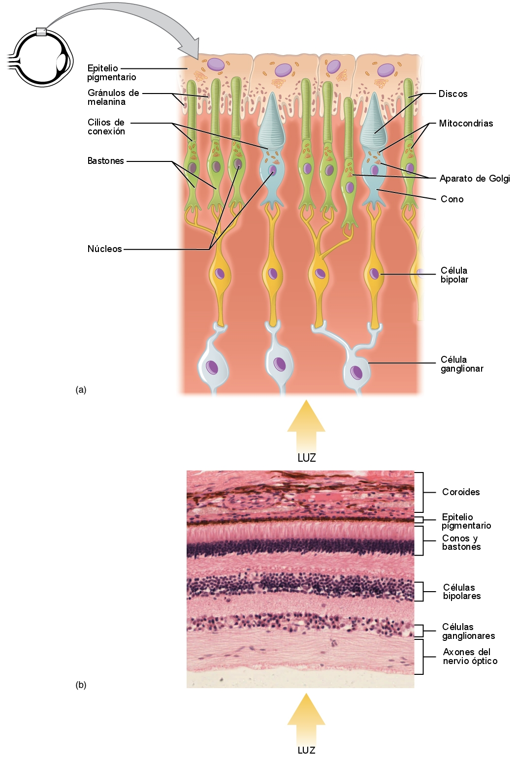 a. Esquema en el que se muestran las diferentes capas que forman la retina humana. b. Imagen microscópica.